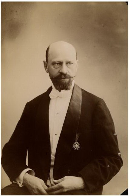 გრიგორი, ივანეს ძე რაევი